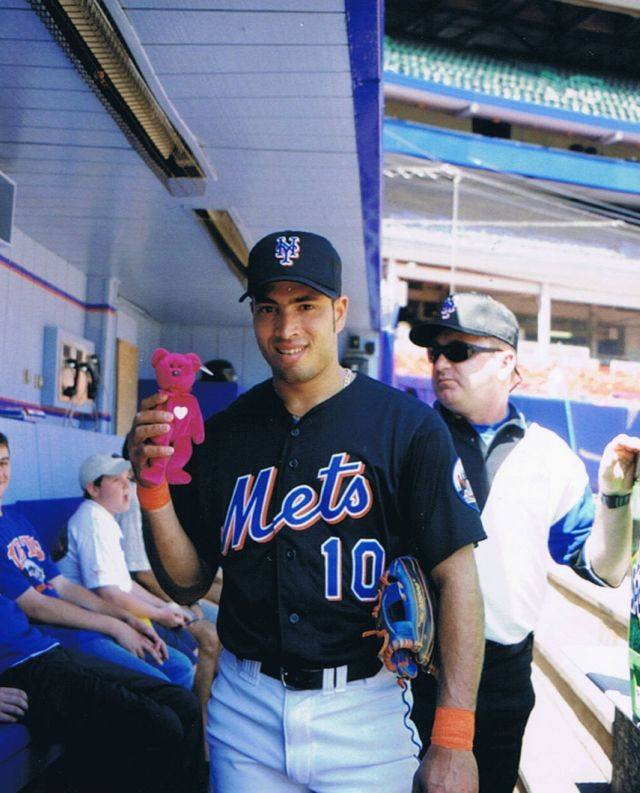 Rey Ordóñez